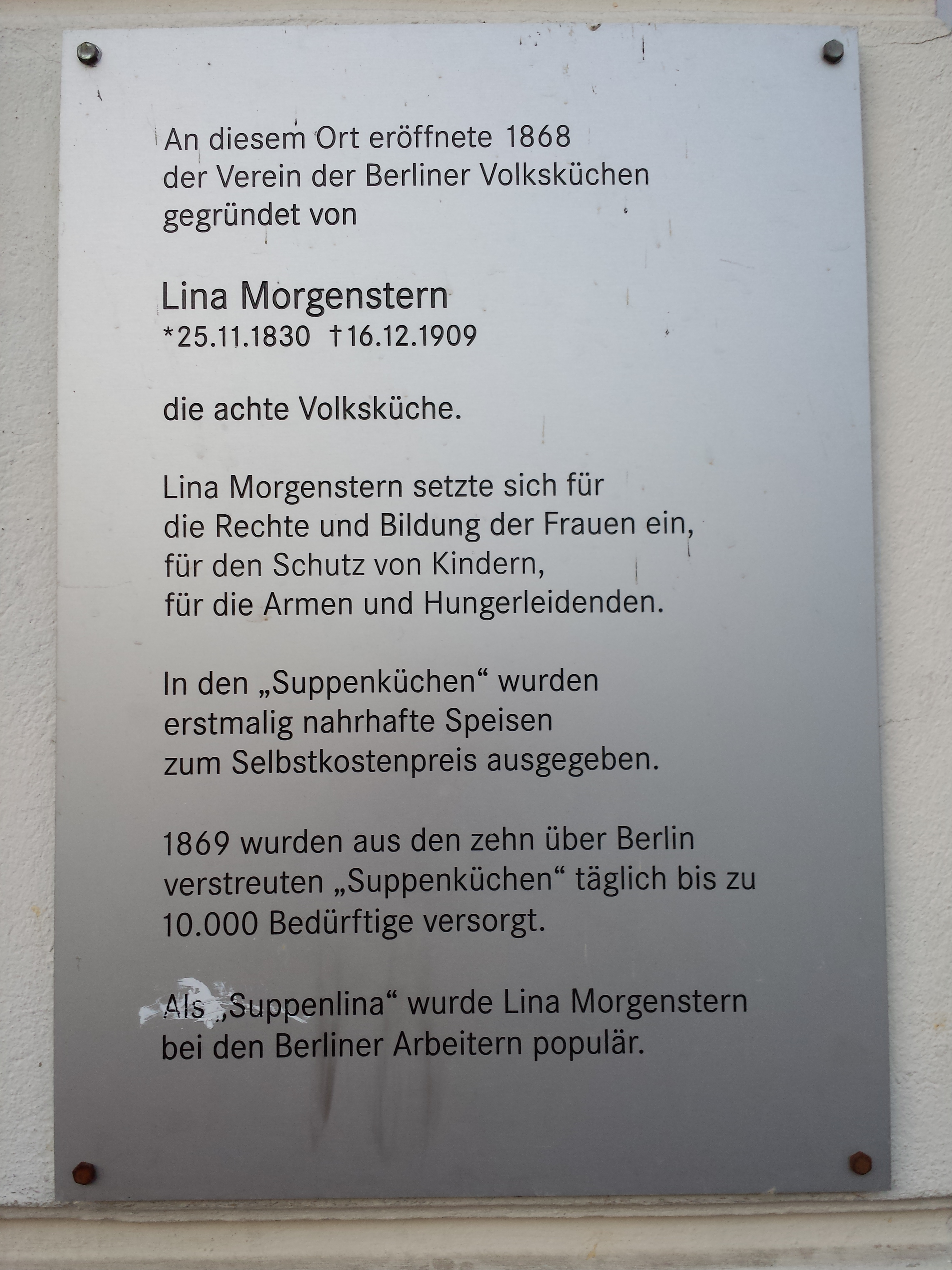 Denktafel in der Friedrichstr. 9 in Berlin-Kreuzberg